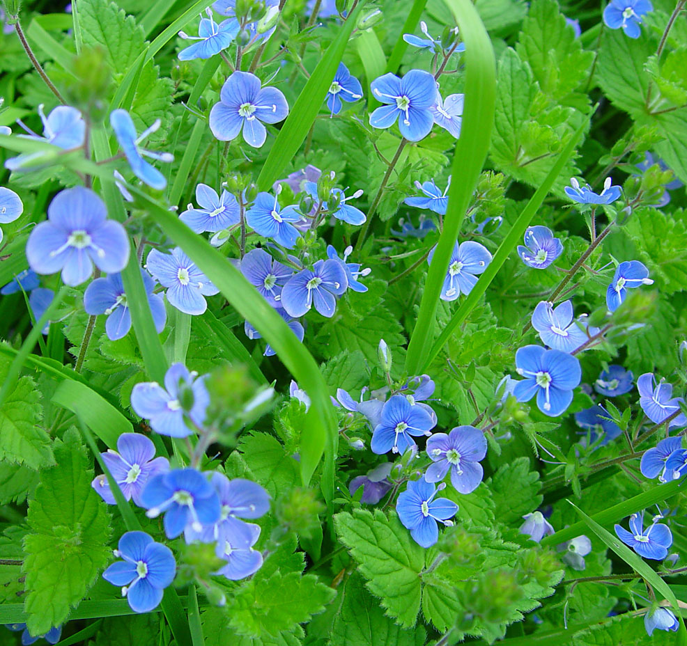 Beschreibung: Veronica chamaedrys Aufnahmedatum: 25. Mai 2002 Fotograf: ArtMechanic